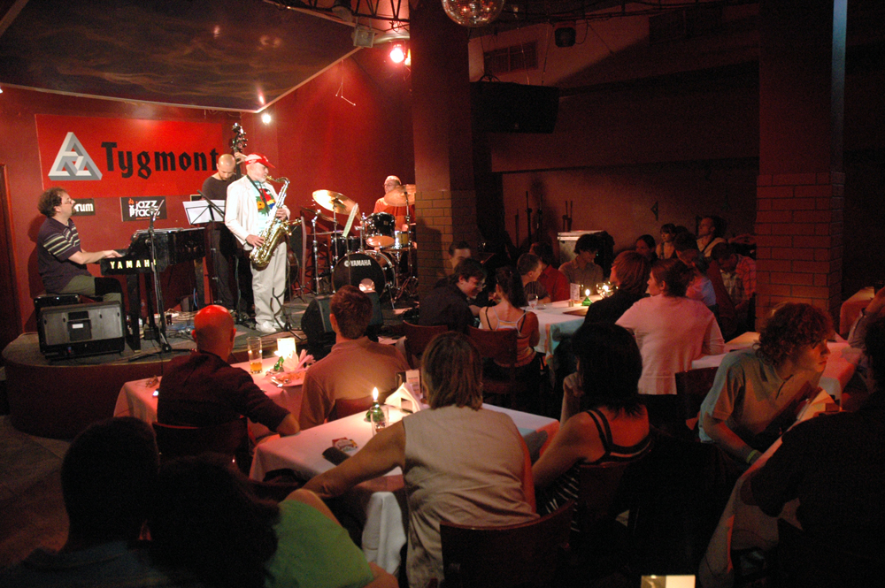 Jan Ptaszyn Wroblewski performing at the most popular jazz club of Warszawa called Tygmont. Photograph by Henryk Kotowski in July 2006.